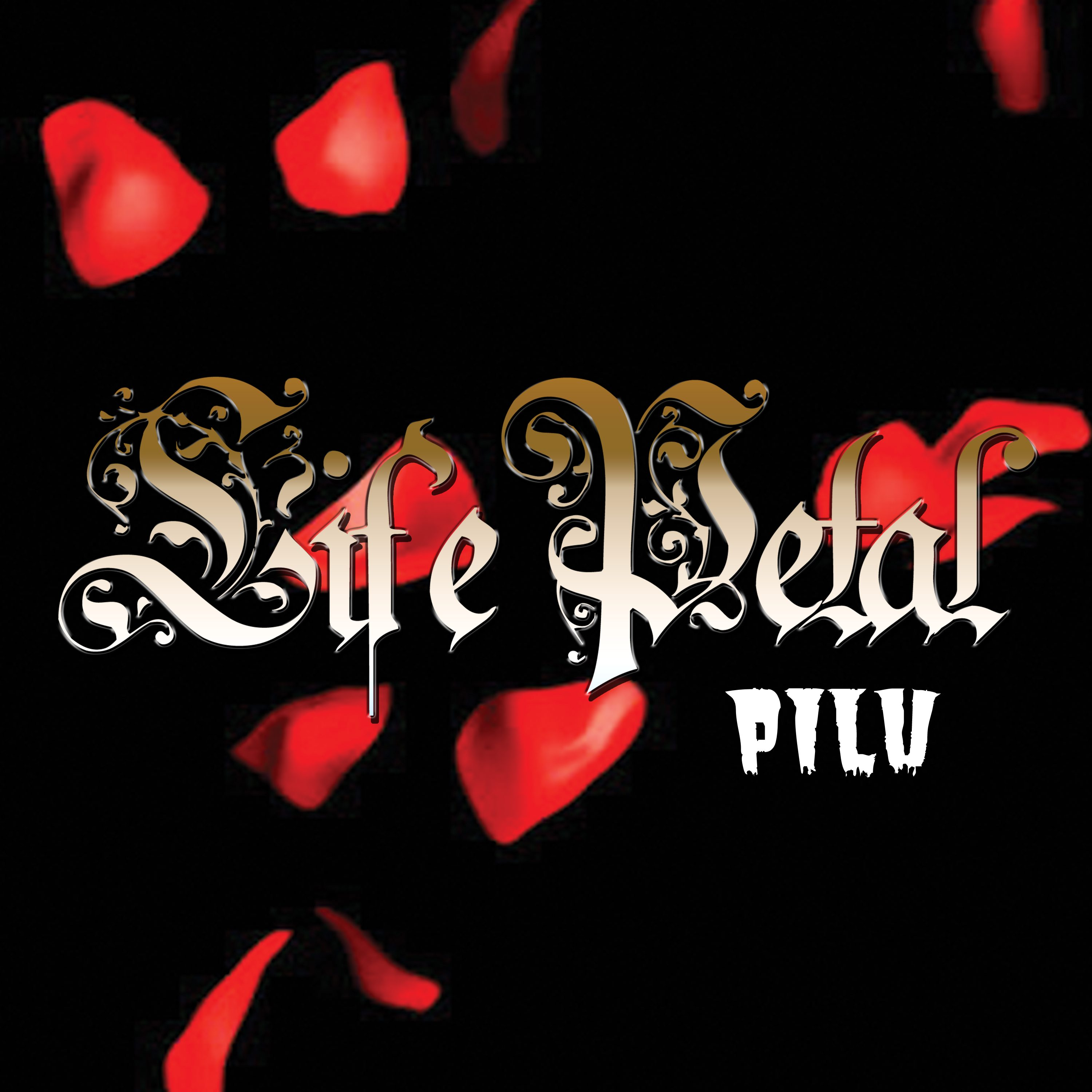 Album Tunggal (Singles) - Life Petal - Pilu